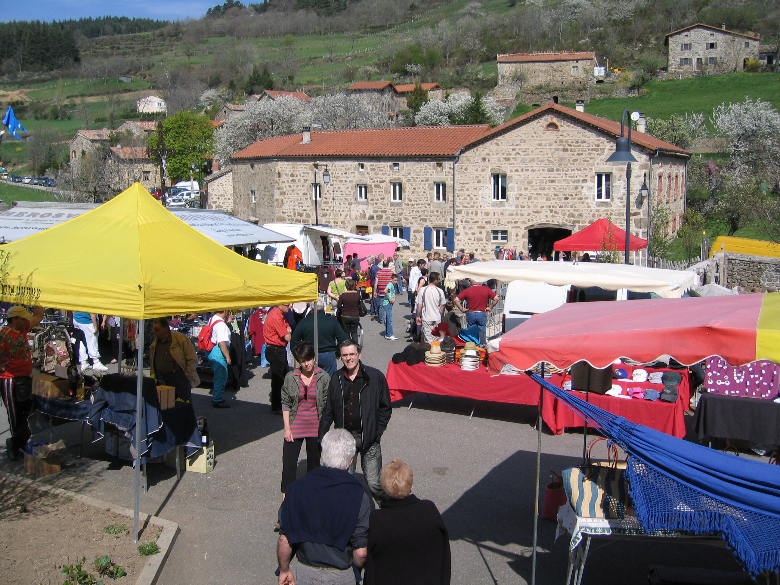 Monestier (Ardèche) foire